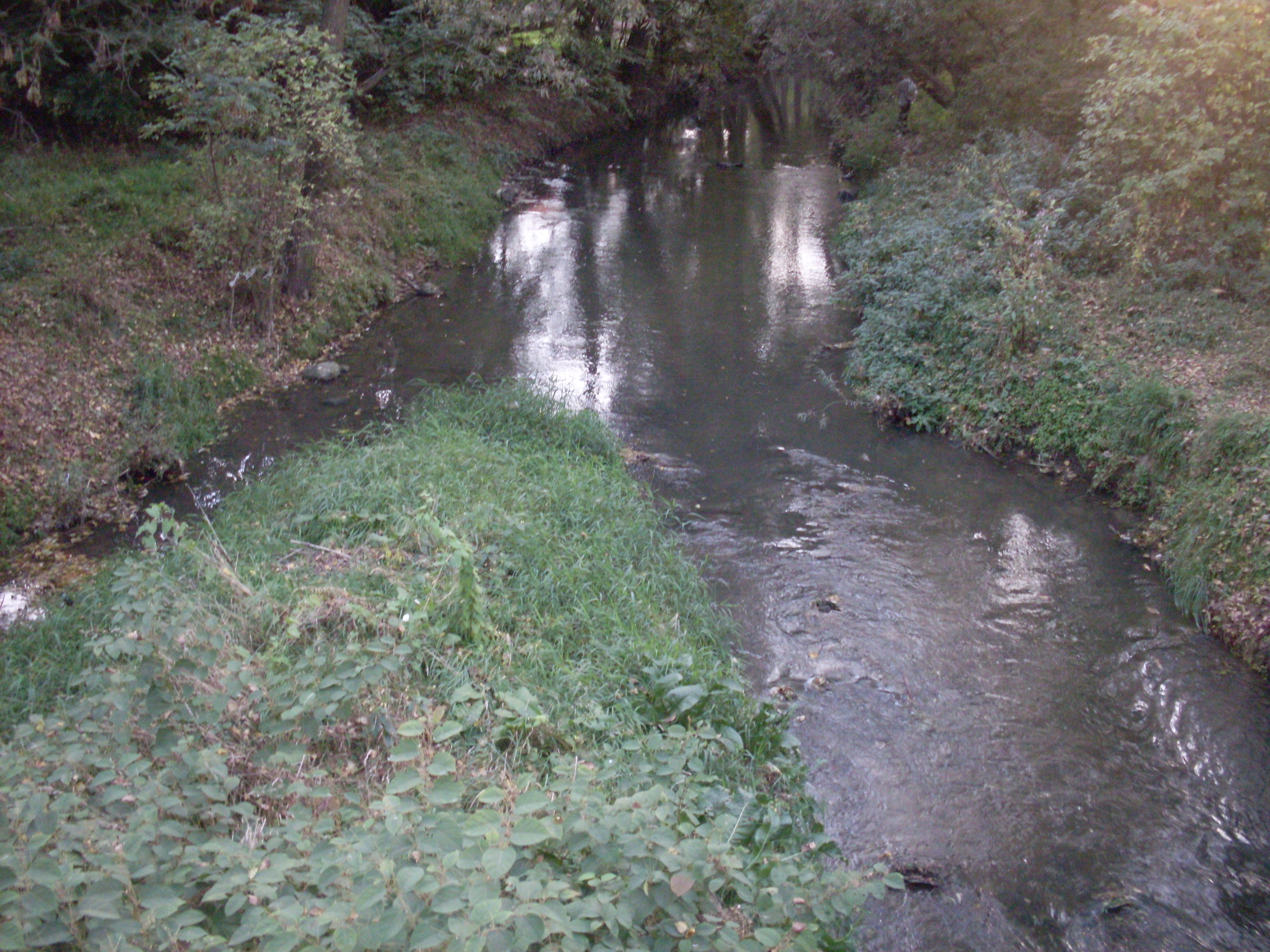 Rzeka Krzeszówka. Krzeszowice Gwoździec (ul. Czycza) przy granicy z Nawojową Górą